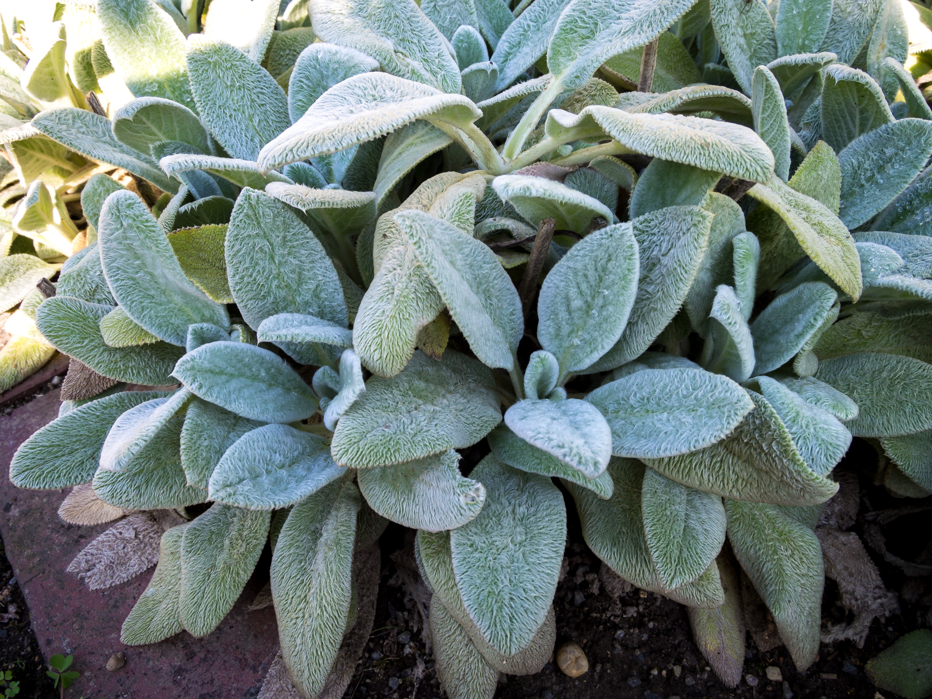 Woll-Ziest, Wollziest 'Silver Carpet', Eselsohren, lat. Stachys byzantina (lanata)